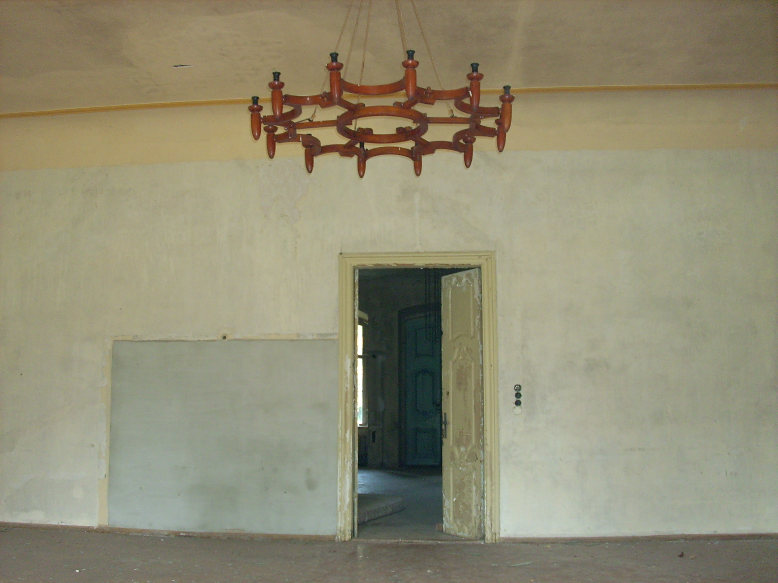 Neues Schloss in Uhyst